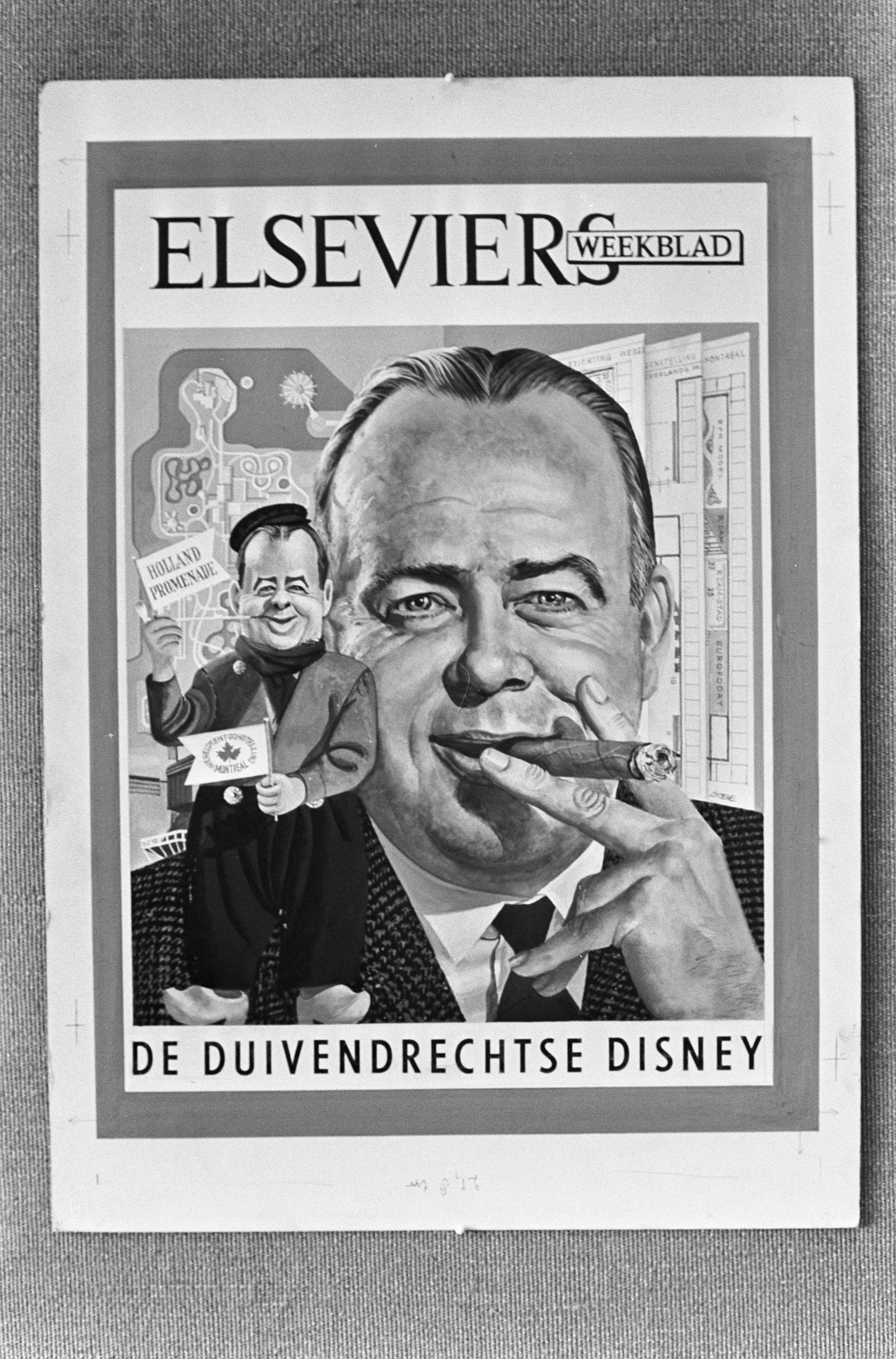 Collectie / Archief : Fotocollectie Anefo Reportage / Serie : [ onbekend ] Beschrijving : "De Duivendrechtse Disney" = Joop Geesink. Opdracht Burhmann. Tekeningen Eppo Doeve Datum : 24 september 1967 Trefwoorden : TEKENINGEN Persoonsnaam : Burhmann, Doeve, Eppo Fotograaf : Nijs, Jac. de / Anefo Auteursrechthebbende : Nationaal Archief Materiaalsoort : Negatief (zwart/wit) Nummer archiefinventaris : bekijk toegang 2.24.01.05 Bestanddeelnummer : 920-7327